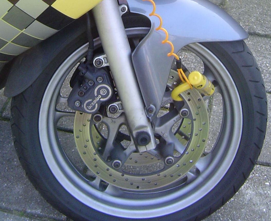 Een Schijfremslot